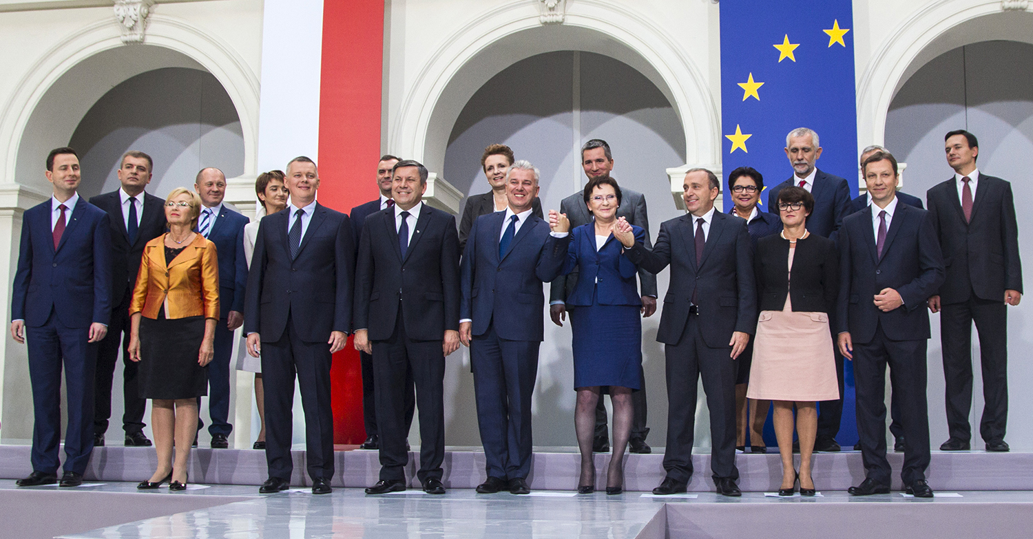 Przedstawienie kandydatów na ministrów w rządzie Ewy Kopacz